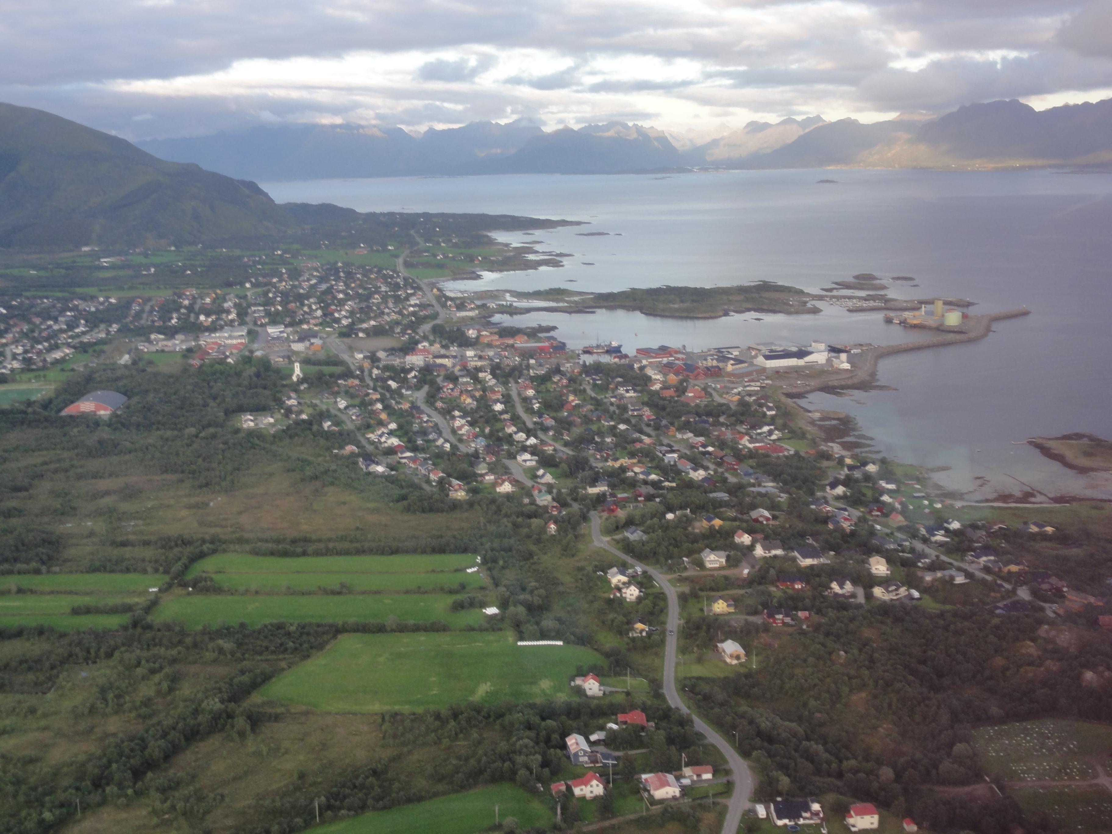 Melbu i Hadsel kommune i Nordland. Hadselfjorden er navnet på havstrekningen utenfor tettstedet.